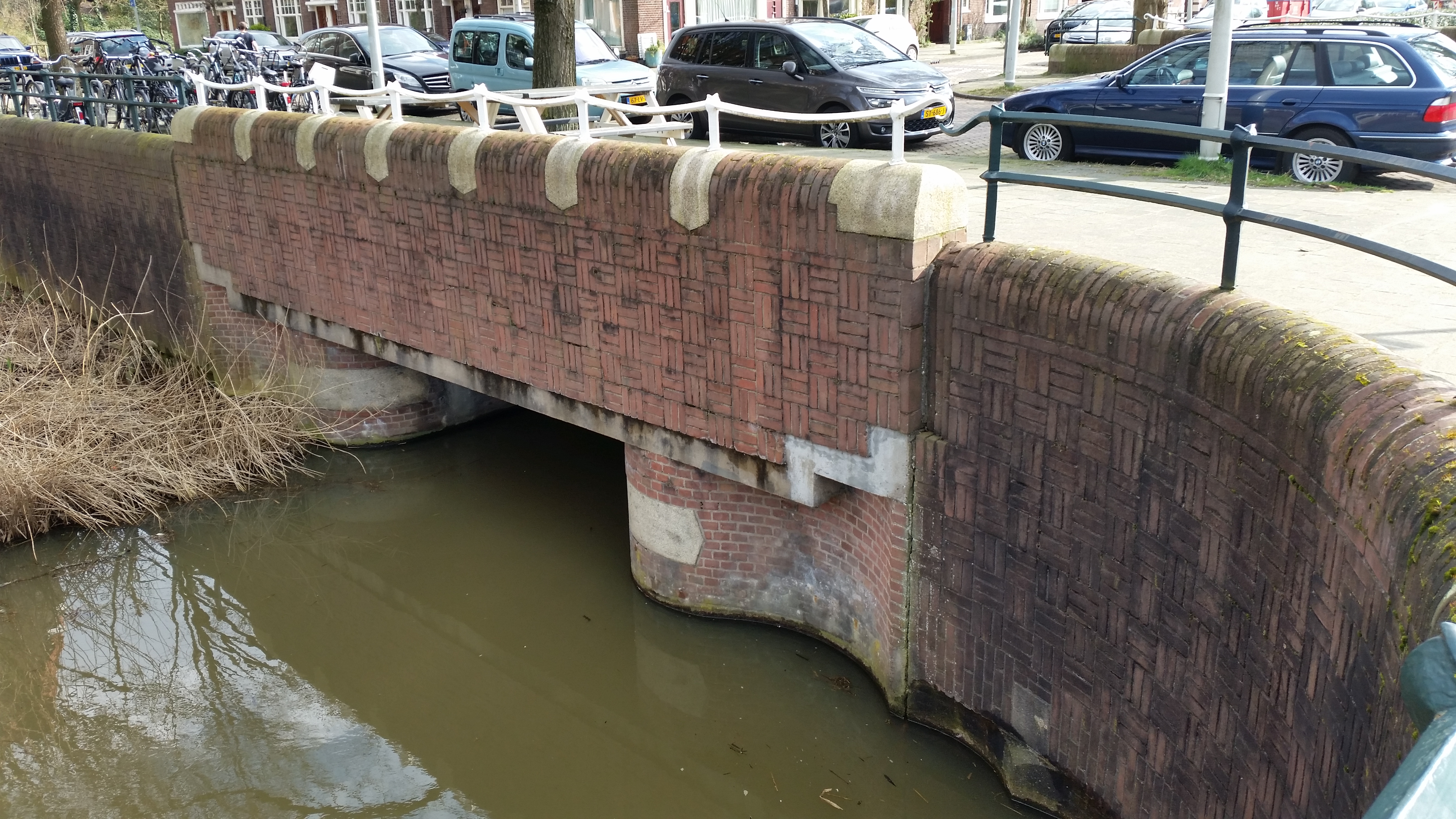 Impressie van brug 337 in Amsterdam-Watergraafsmeer, Archimedesplantsoen/Molenwetering (maart 2020)